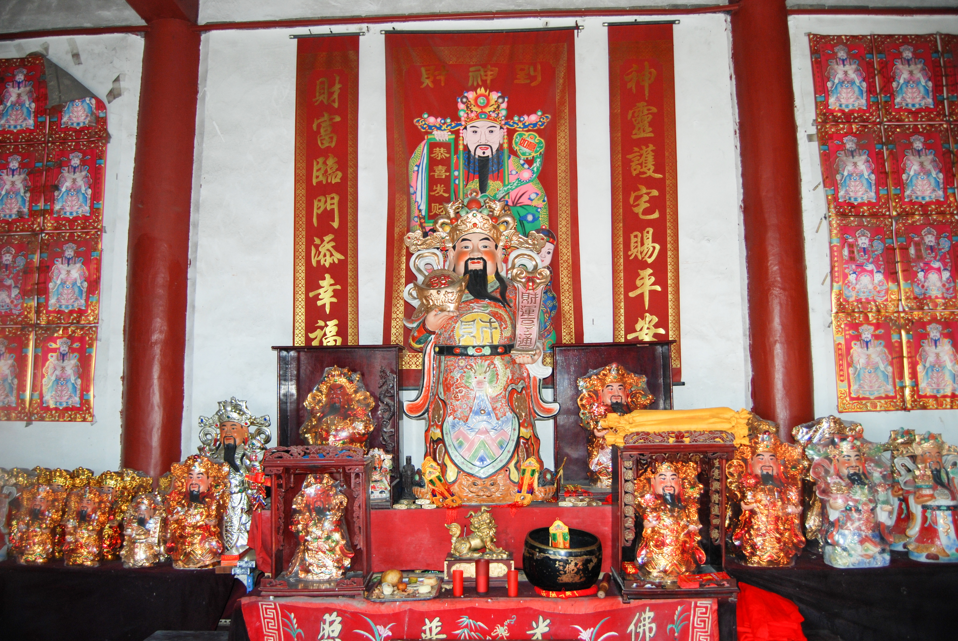 中文（中国大陆）: 各种财神，摄于泰山